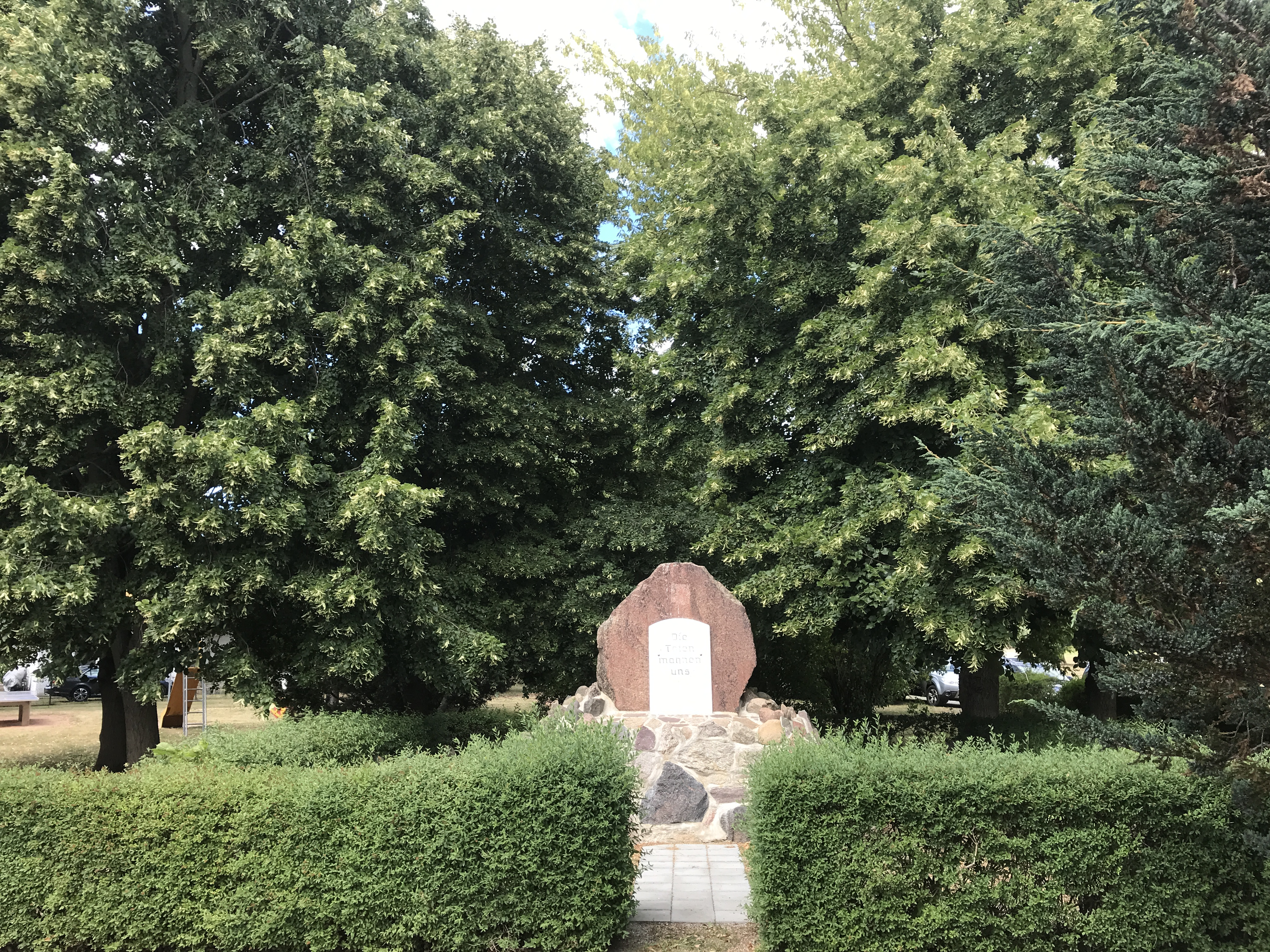 Sellendorf, ein Ortsteil der Gemeinde Steinreich im Land Brandenburg